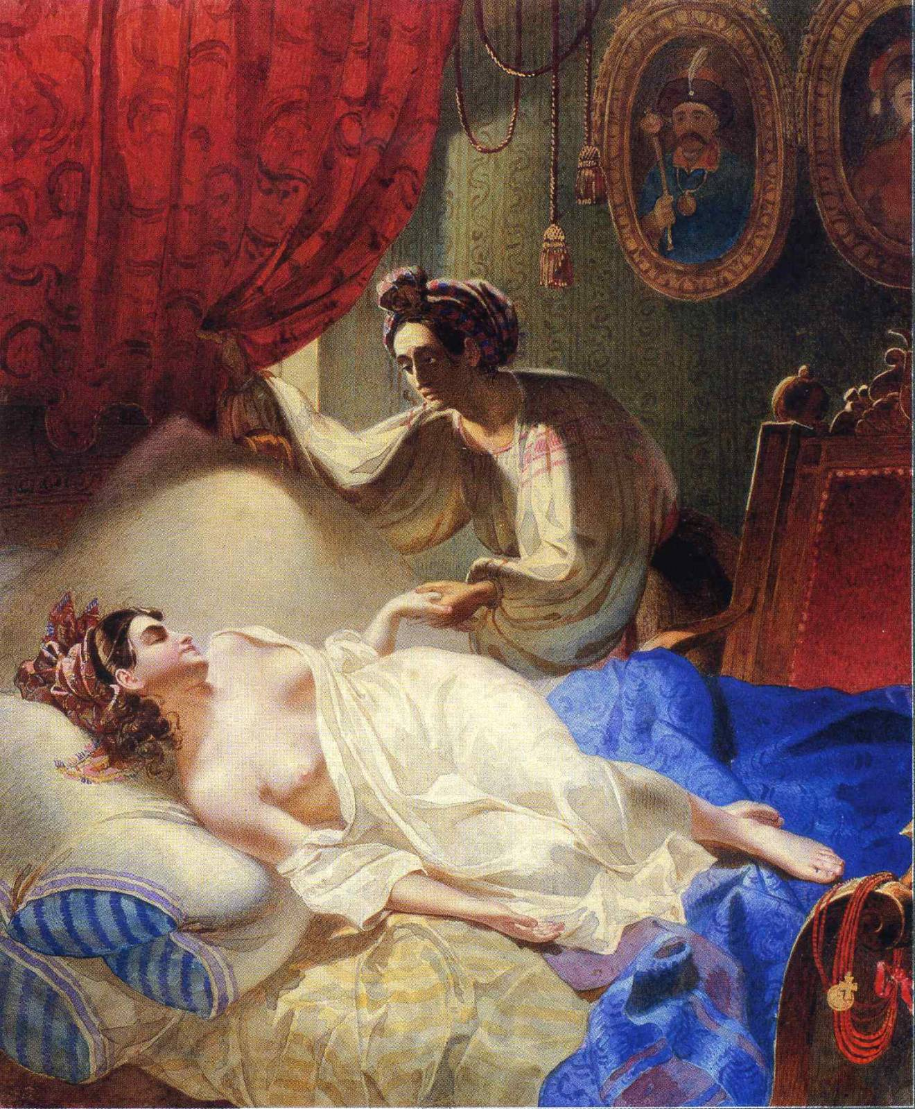 Мария